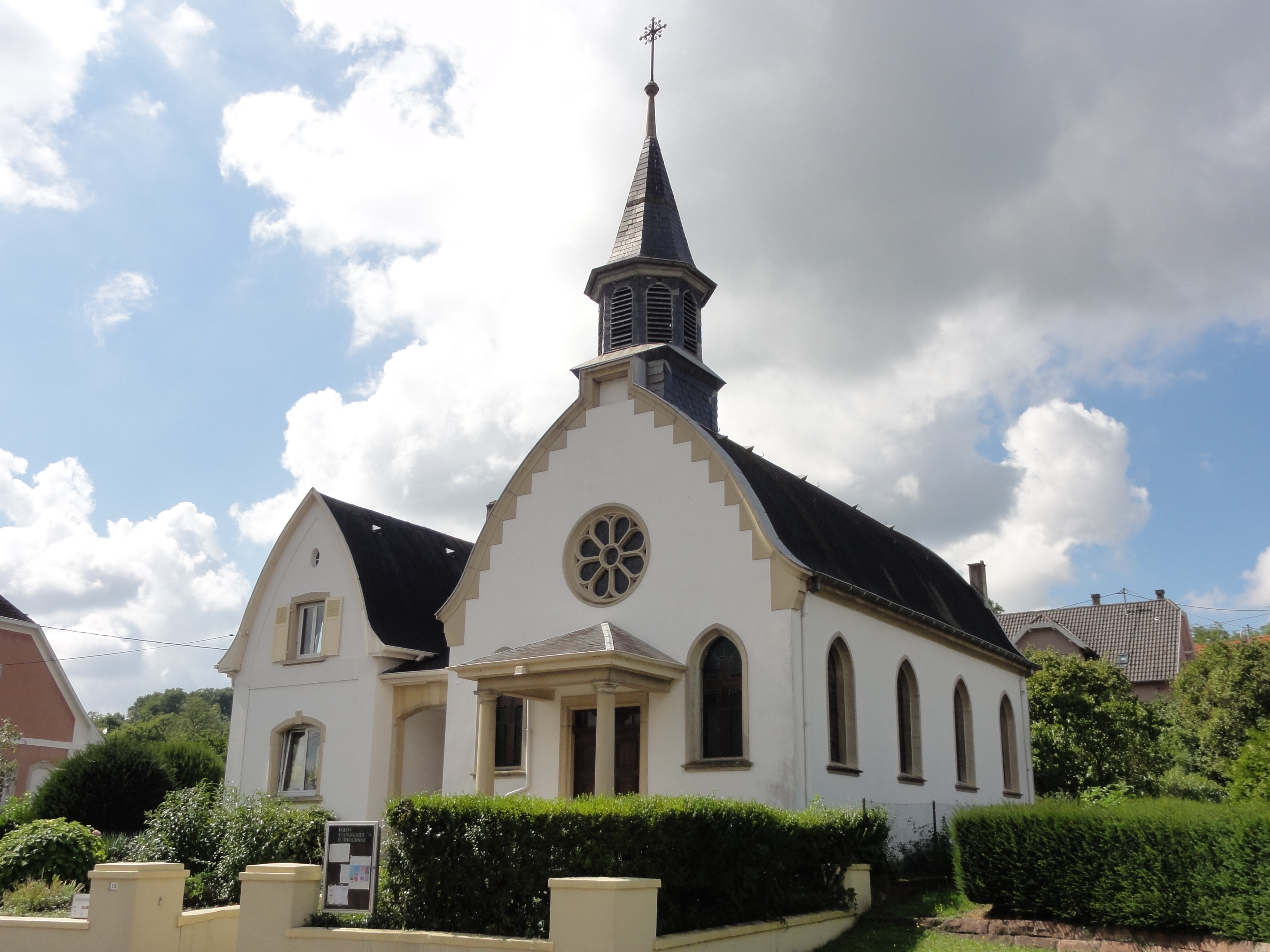 Alsace, Bas-Rhin, Wœrth, Église évangélique luthérienne de la Sainte-Trinité (1930), 12 route de Haguenau.